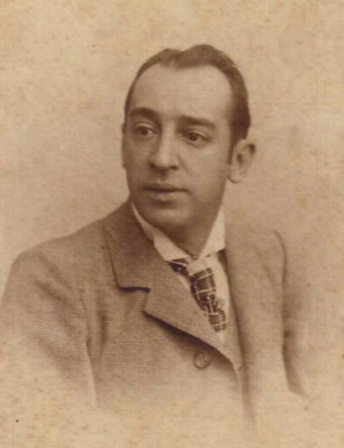 Don Jose Riquelme, 1898. Autor: Fotografía M.Compañy c/ Fuencarral 29 Madrid. 1898